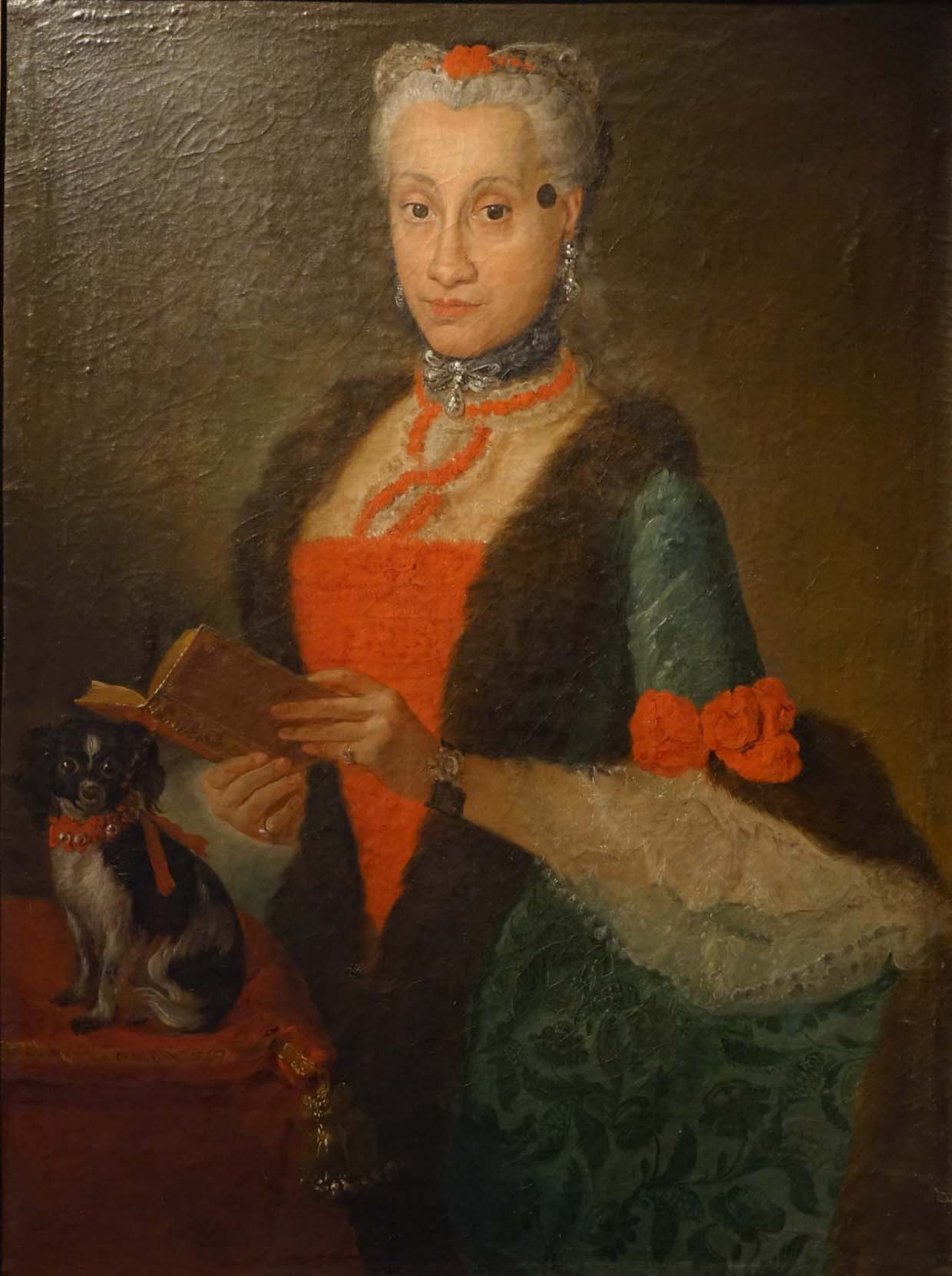 Zenobia Revertera, duchessa di Castropignano